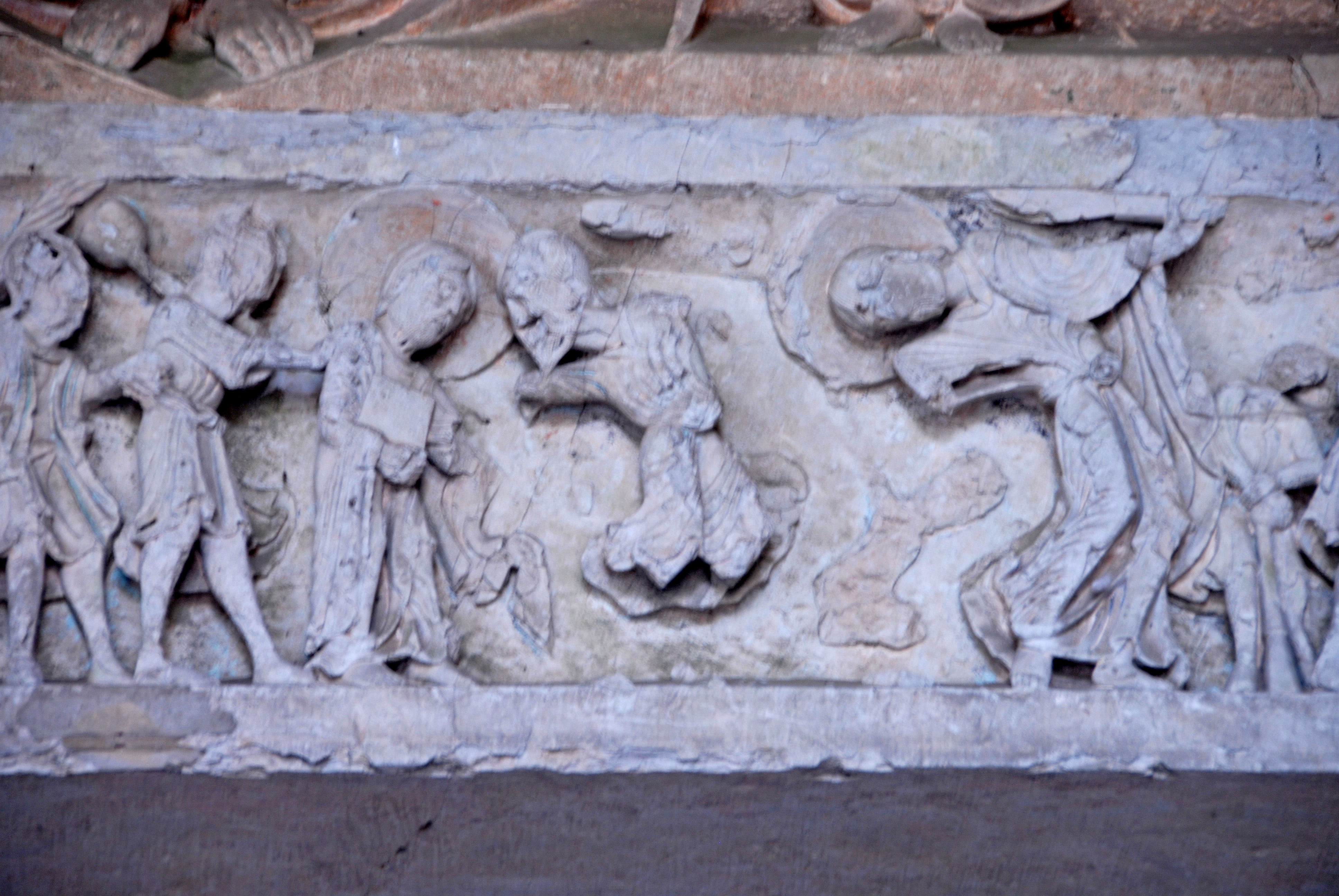 Portal, Türsturzrelief, Gefangennahme Jesu